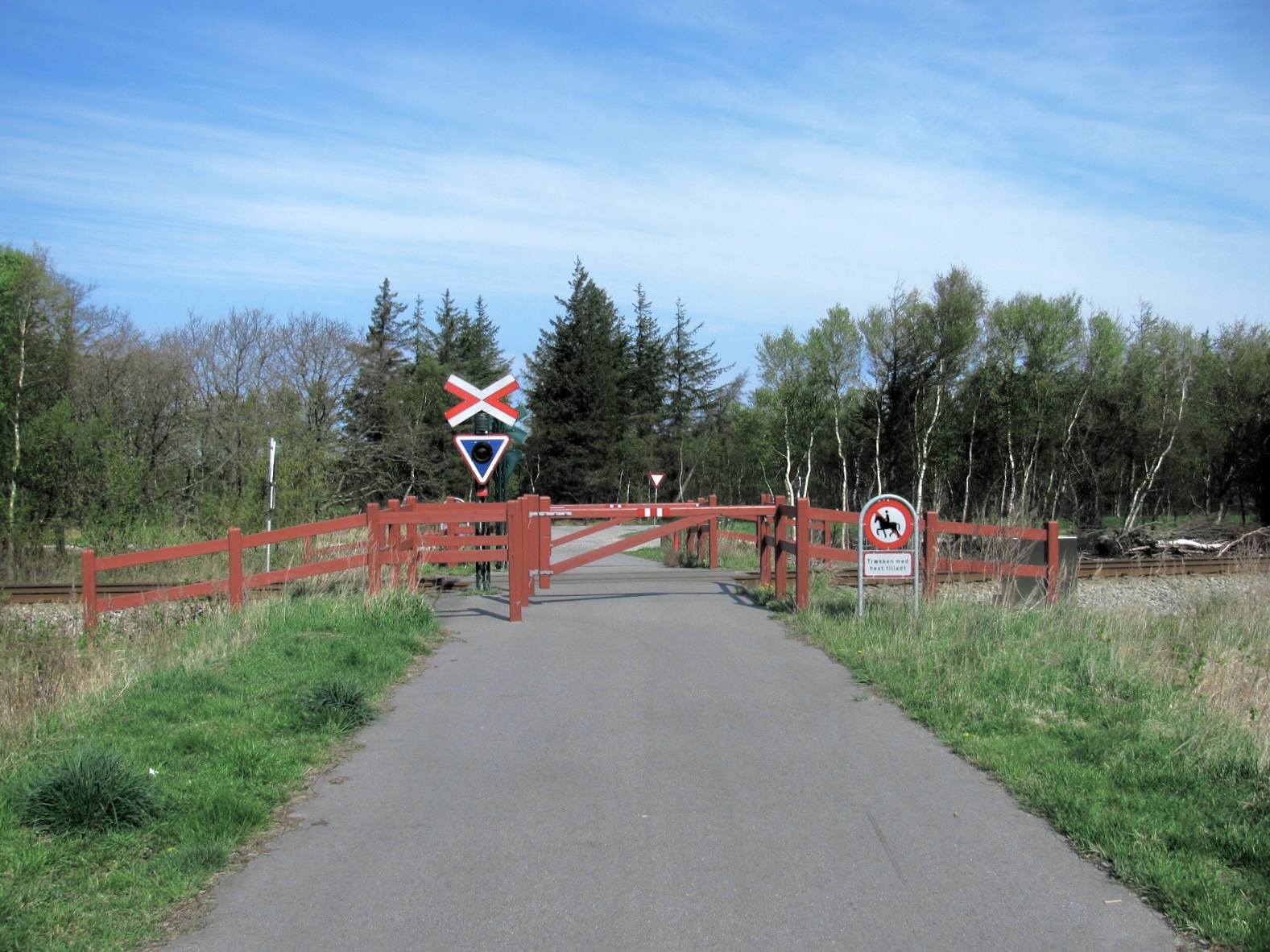 Jernbaneoverskæring, Skagensbanen.